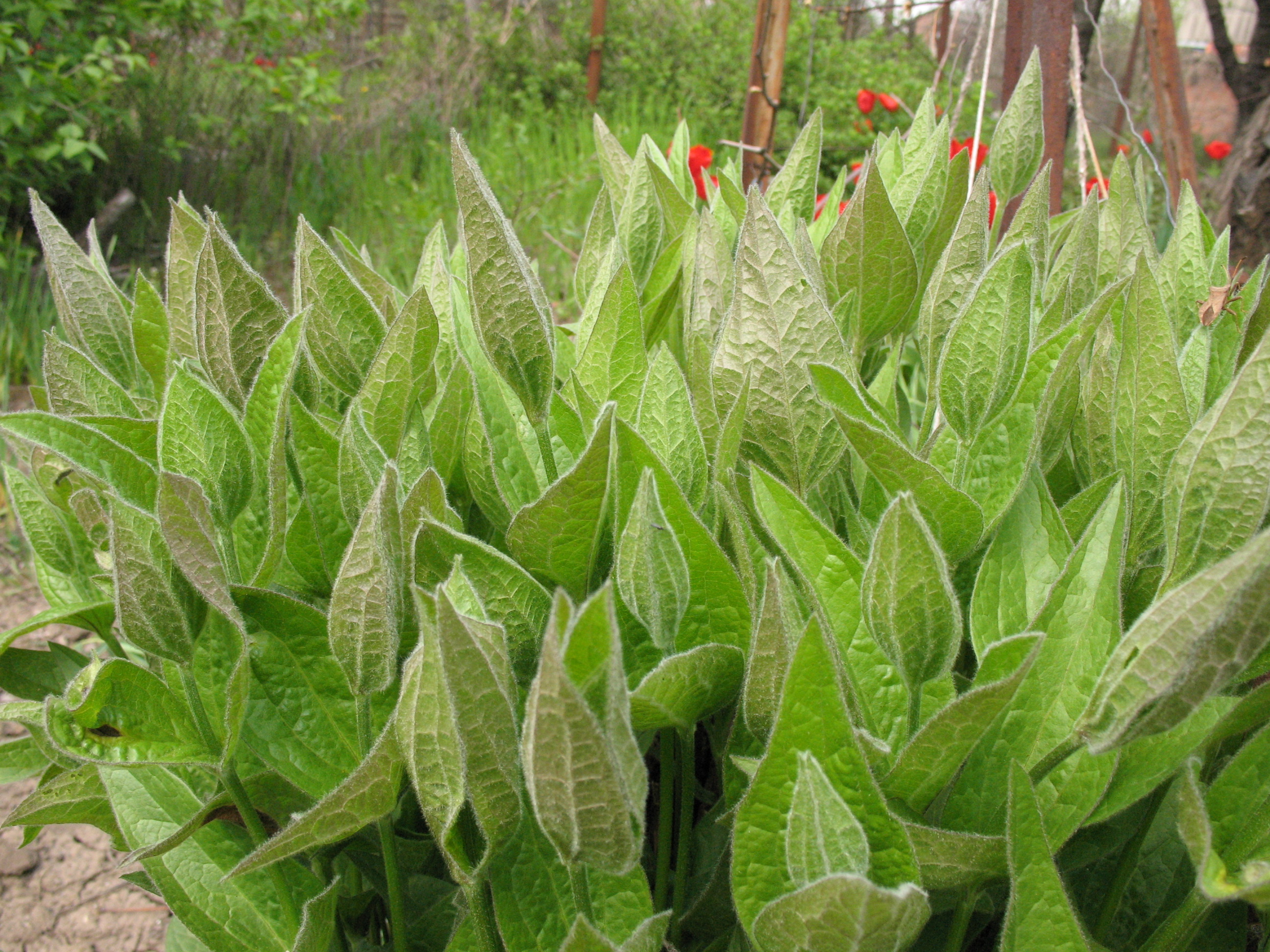 Plant Растение